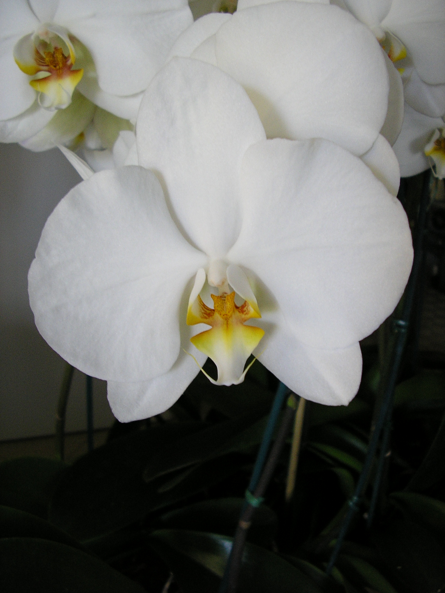 Autore: Reedj. Orchidea, particolare del fiore